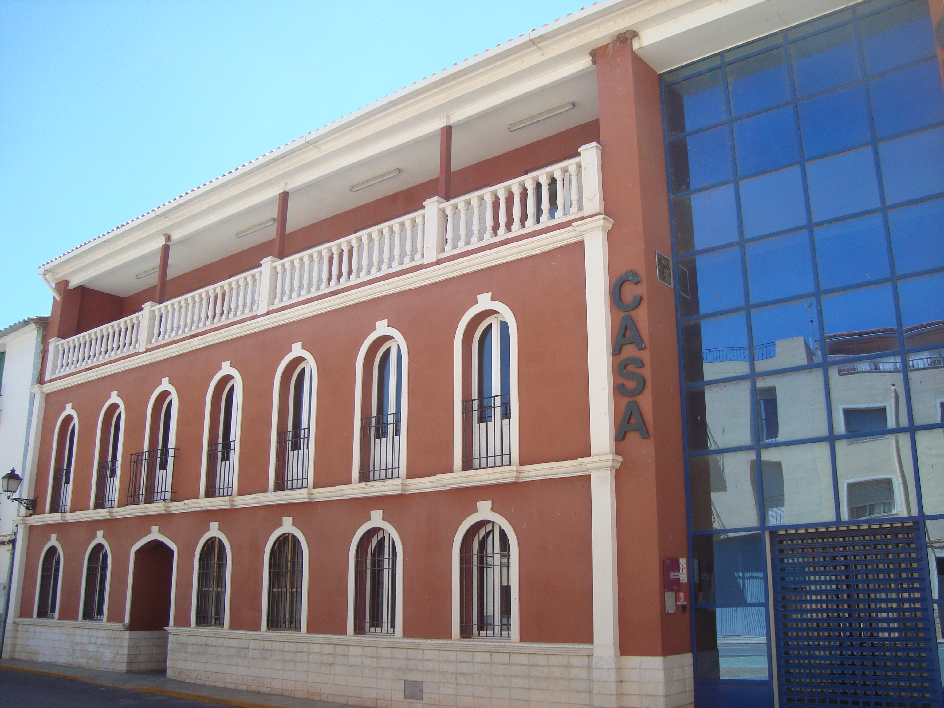 Casa de la Cultura (Figueroles)